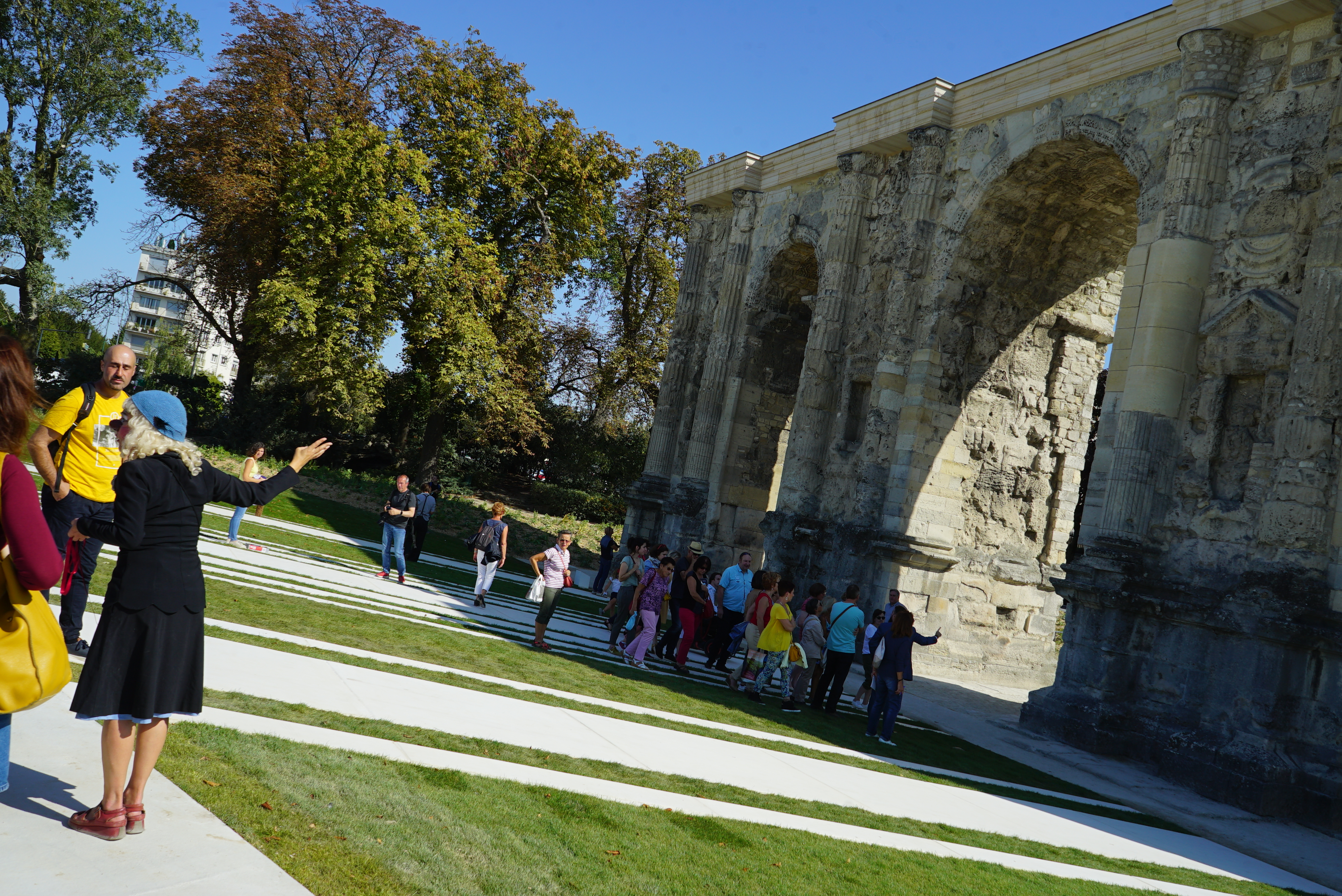 lors des Journées européennes du patrimoine de 2019 à Reims.